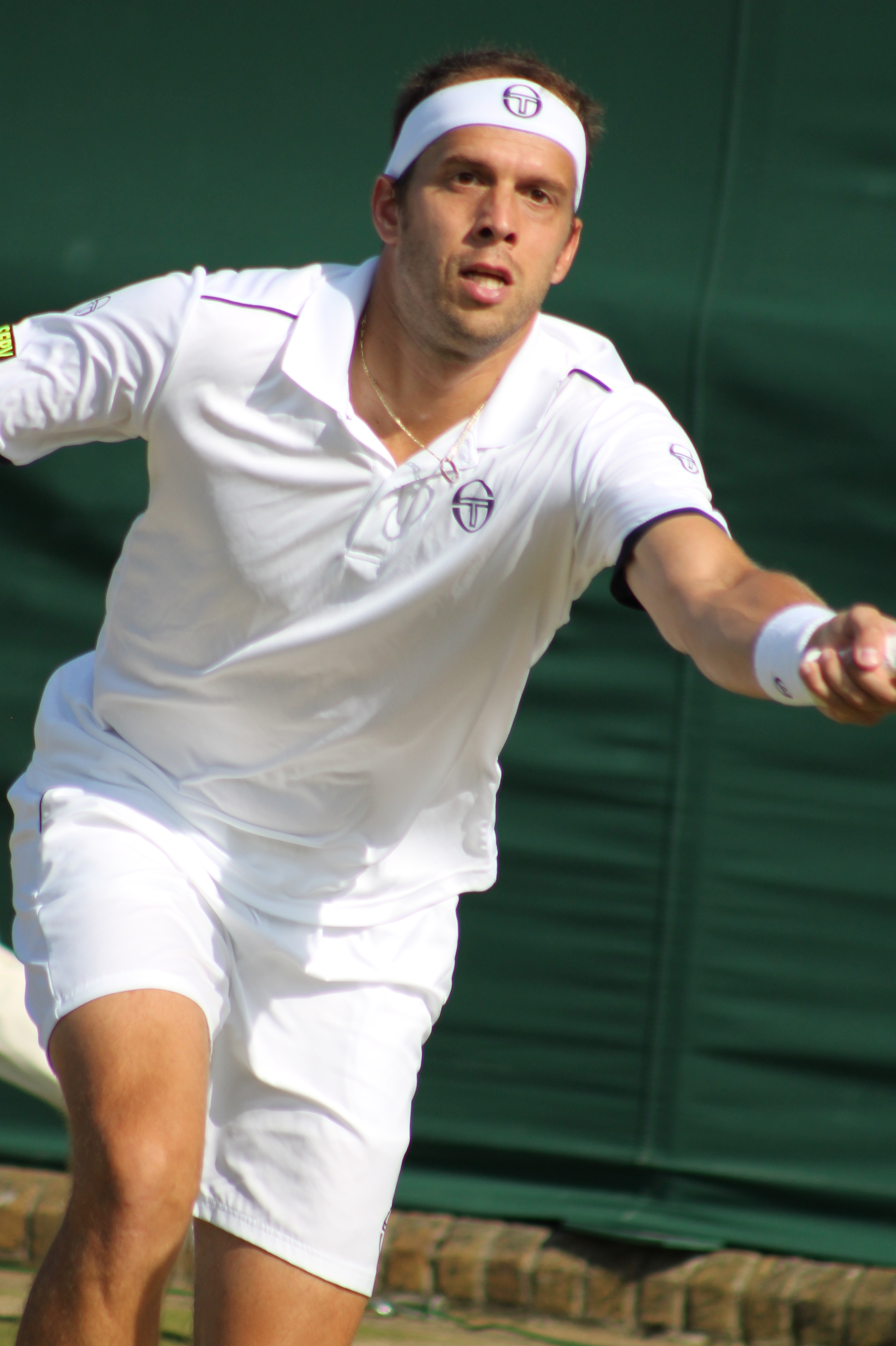 Muller WM15 (6)